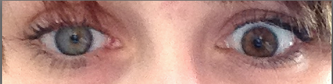 Fullständig Heterokromi hos en kvinna